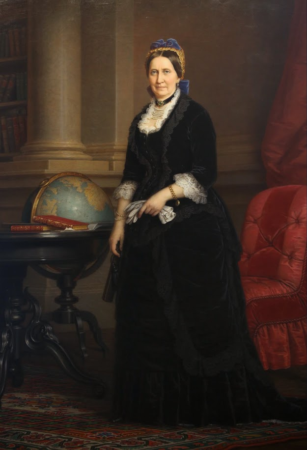 Veres Pálné, Barabás Miklós olajfestménye